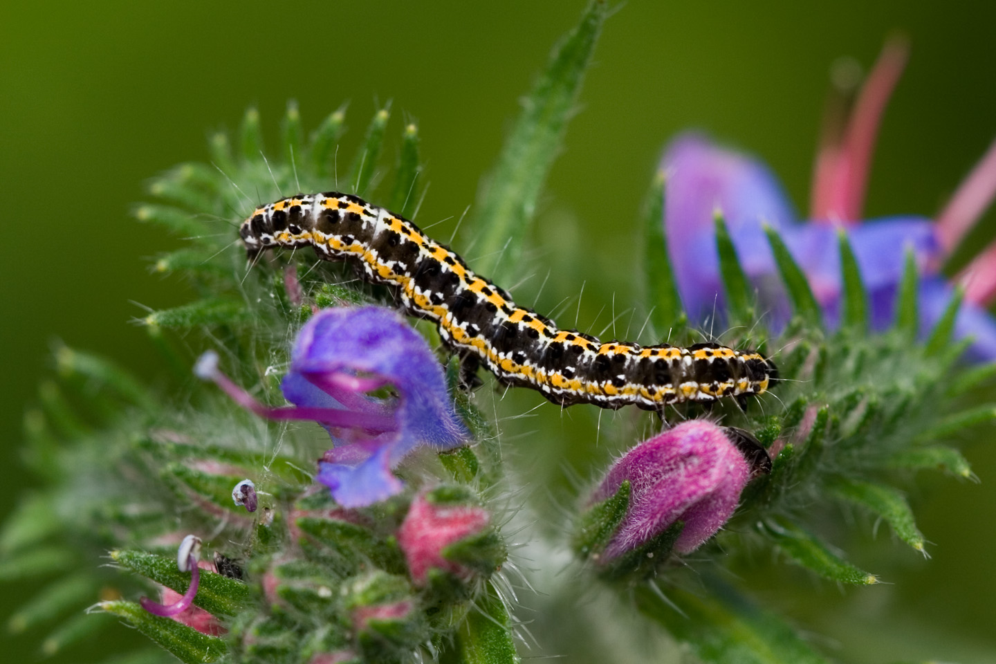 Ethmia bipunctella (Lepidoptera).